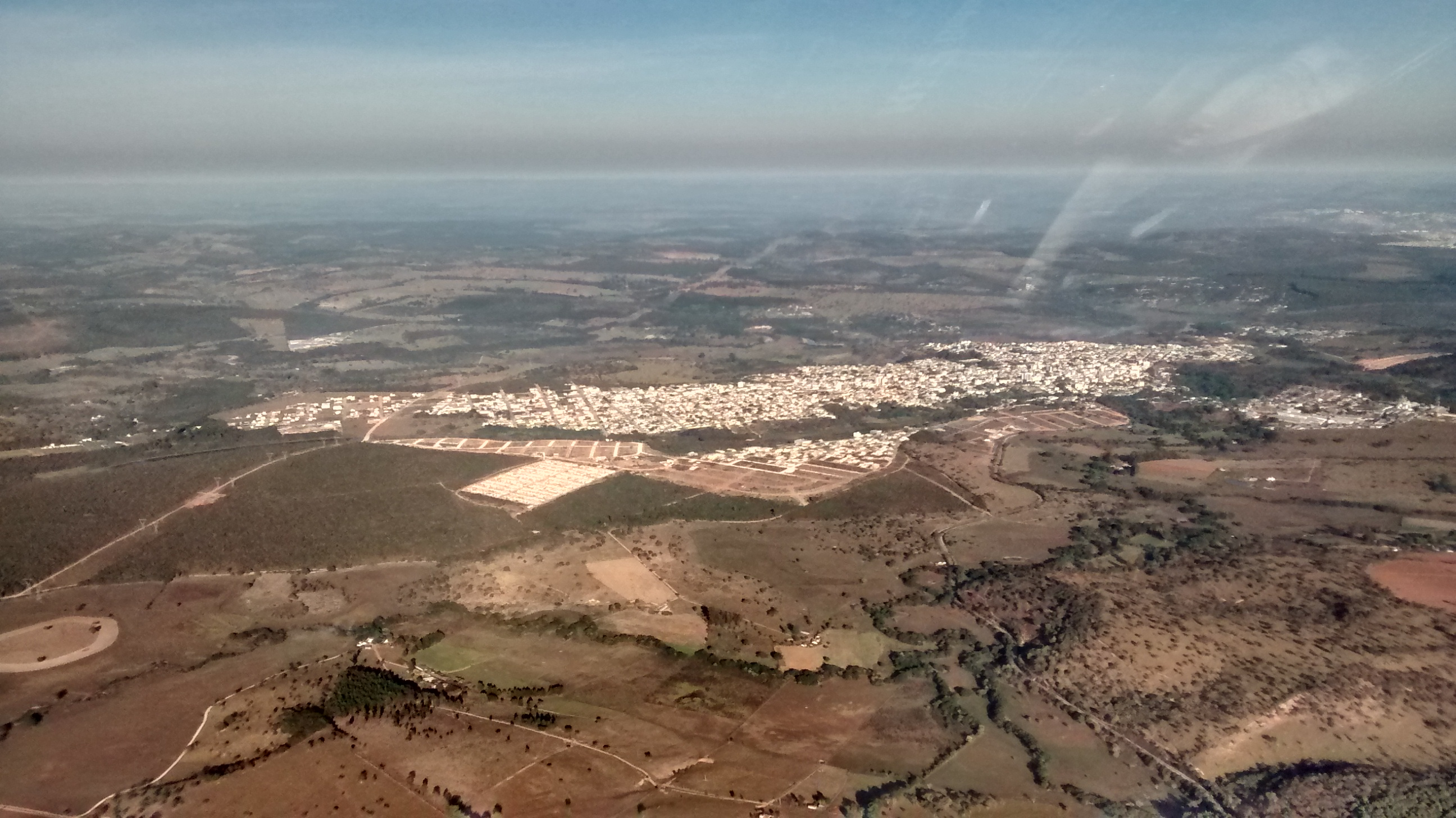 Carmo do Cajuru